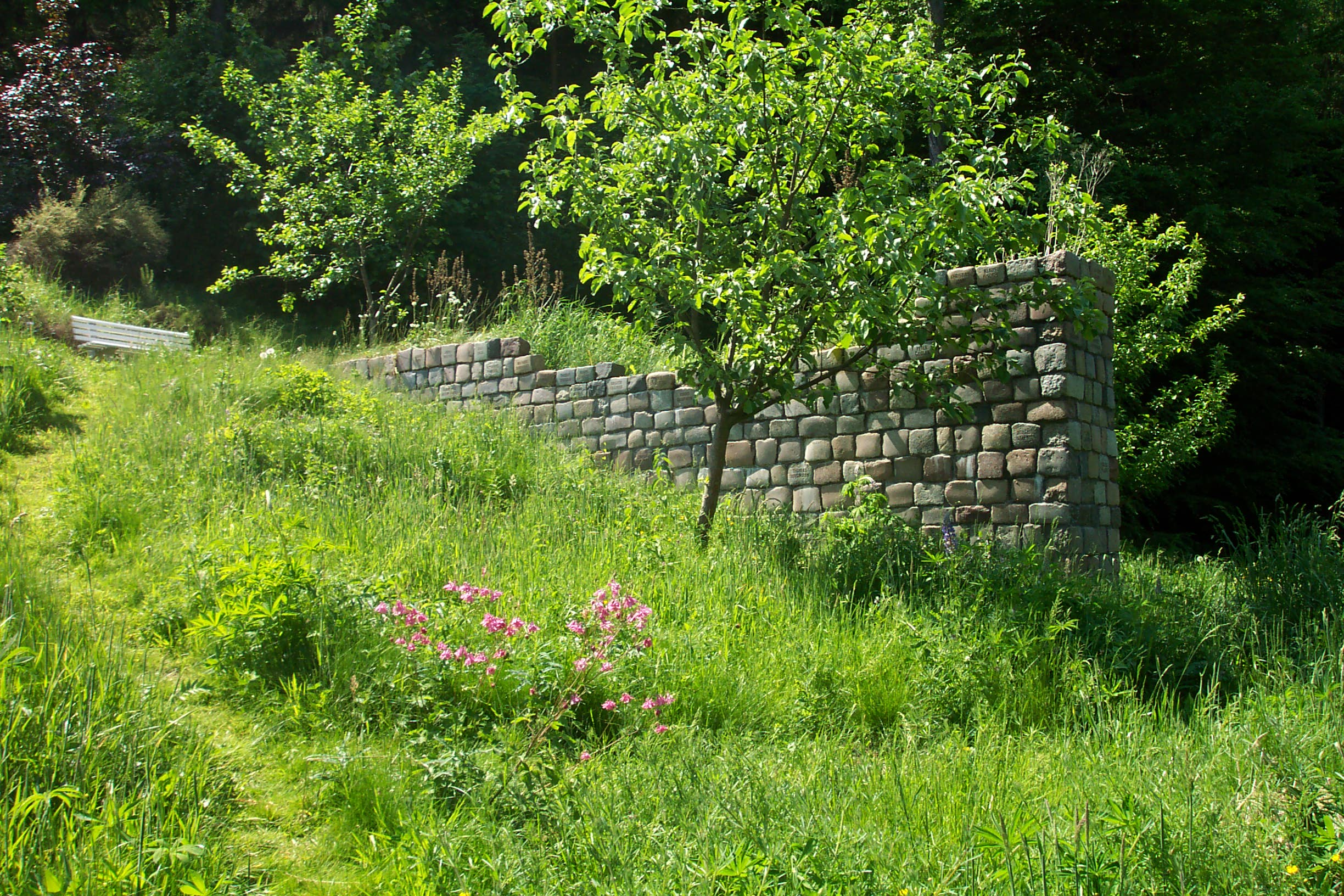 Denkraum "Namen und Steine" von Tom Fecht, Teil des Projektes "Memoire nomade"